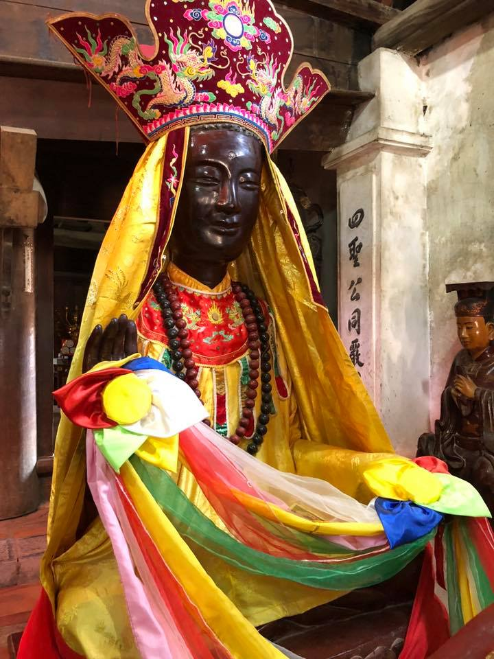 Tượng Pháp Vũ - di vật cuối cùng còn lại của chùa Đậu cổ, hiện đặt tại chùa Dâu